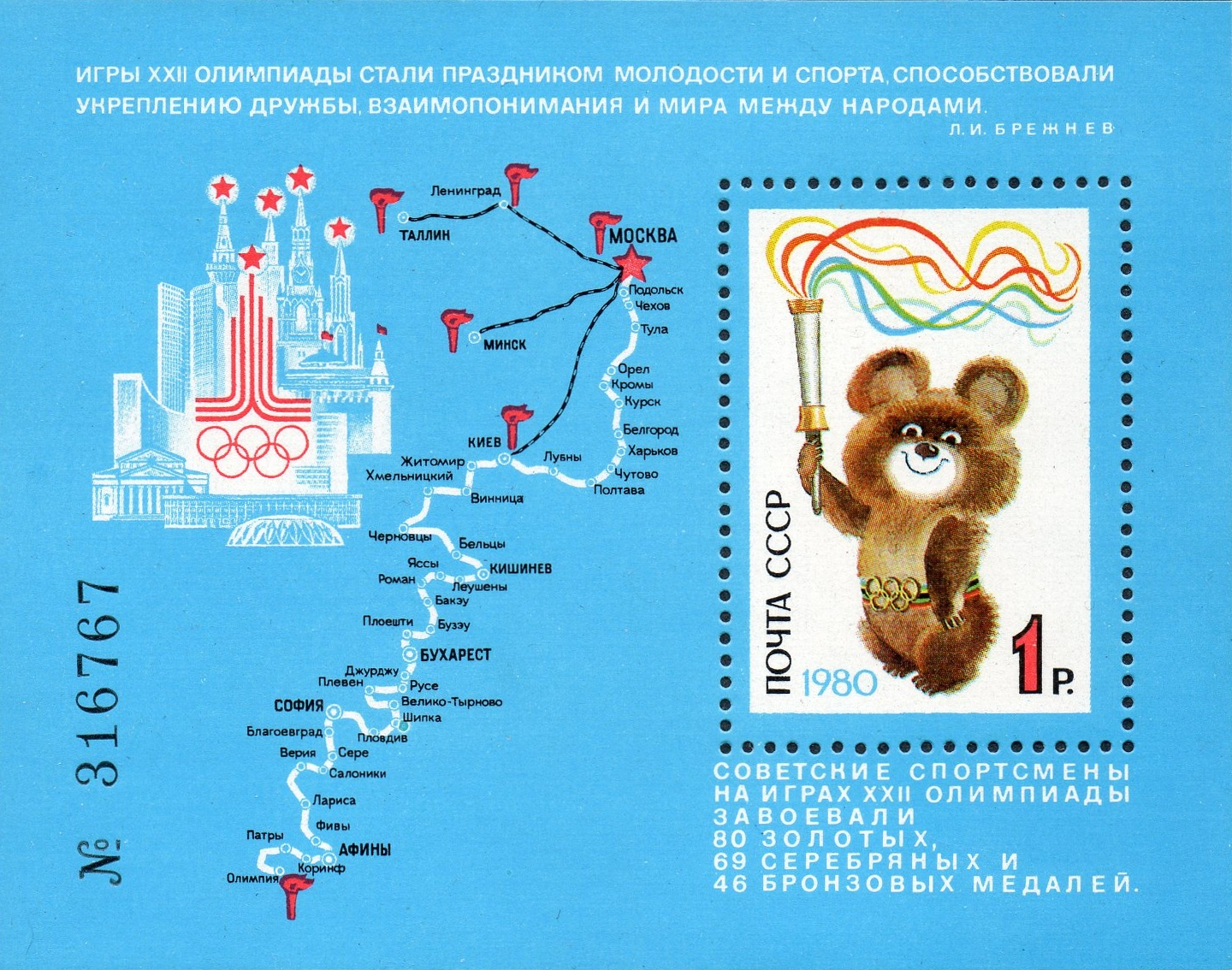 Рисунок марки: талисман Олимпиады - Мишка с факелом Рисунок полей: эмблема Олимпиады на фоне московских зданий, маршрут факельной эстафеты, памятный текст